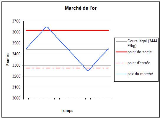 points d'entrée et de sortie sur le marché de l'or